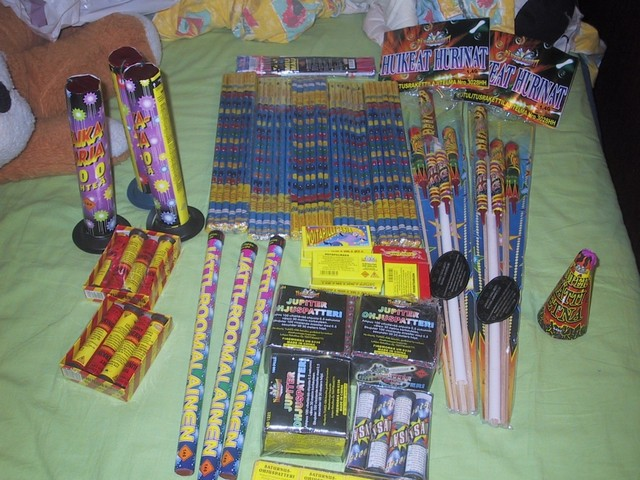 Finland Fireworks